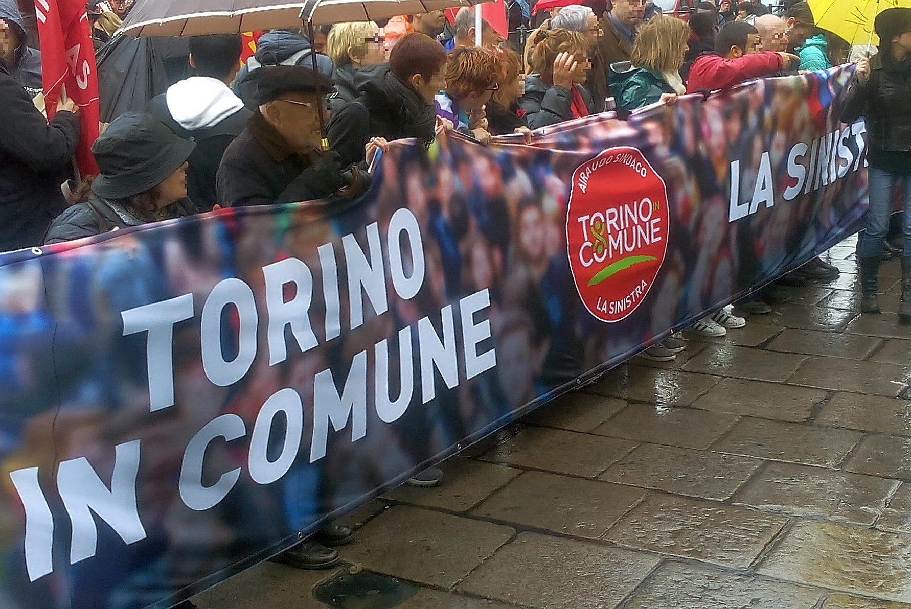 Lista Airaudo - Primo Maggio 2016, Torino piazza Castello